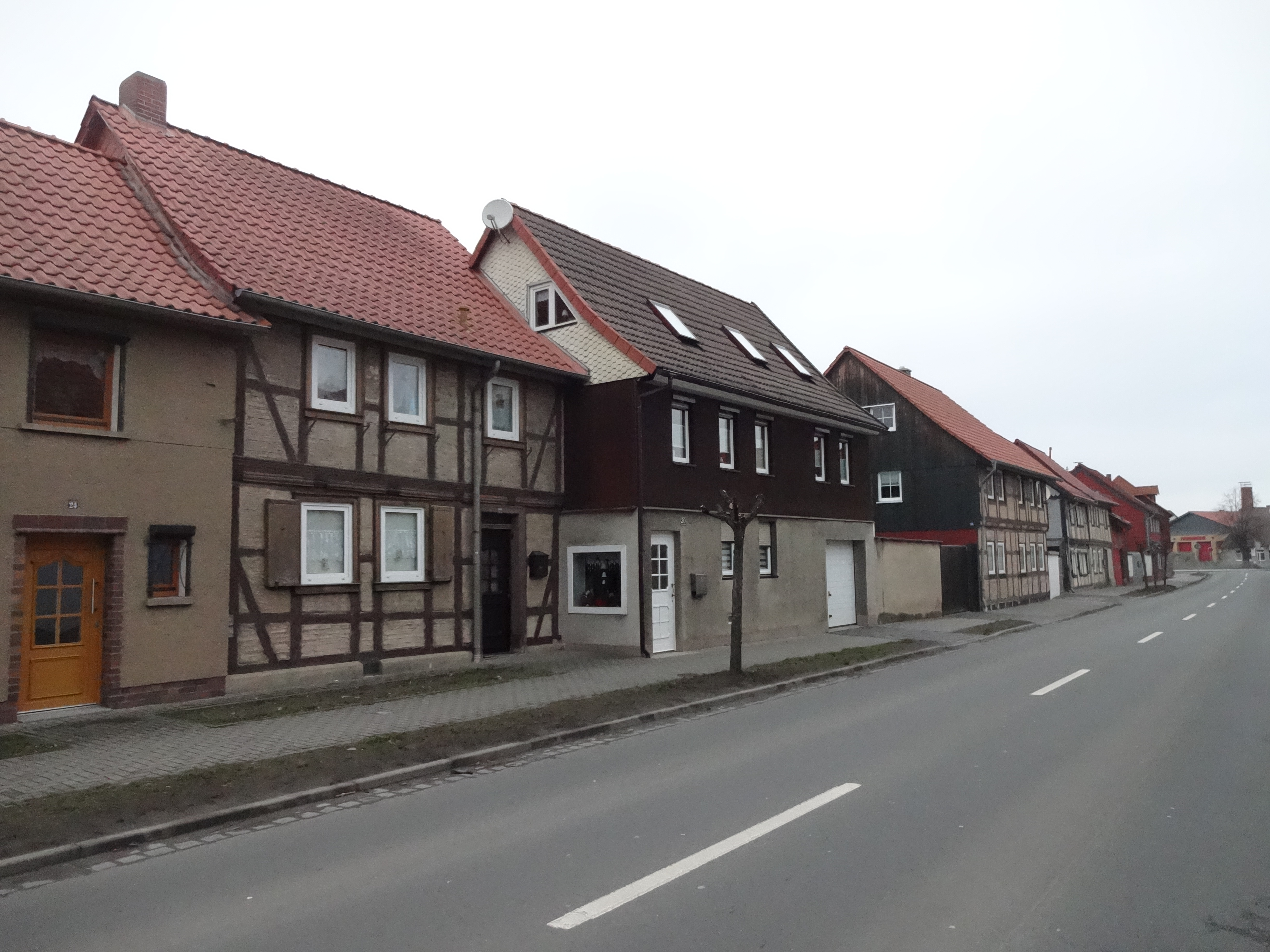 Wohnhäuser in der Wernigeröder Straße in Derenburg (ehemalige denkmalgeschützte Häuserzeile 2-22)